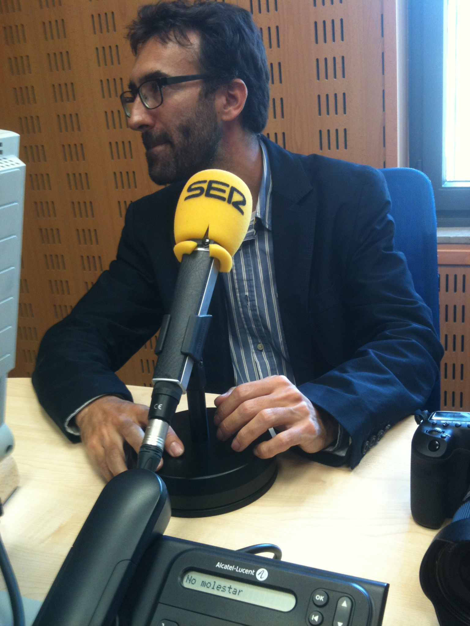 El fotógrafo y diseñador Asís G. Ayerbe en los estudios de Radio Castilla (Burgos, 29 de mayo de 2015).